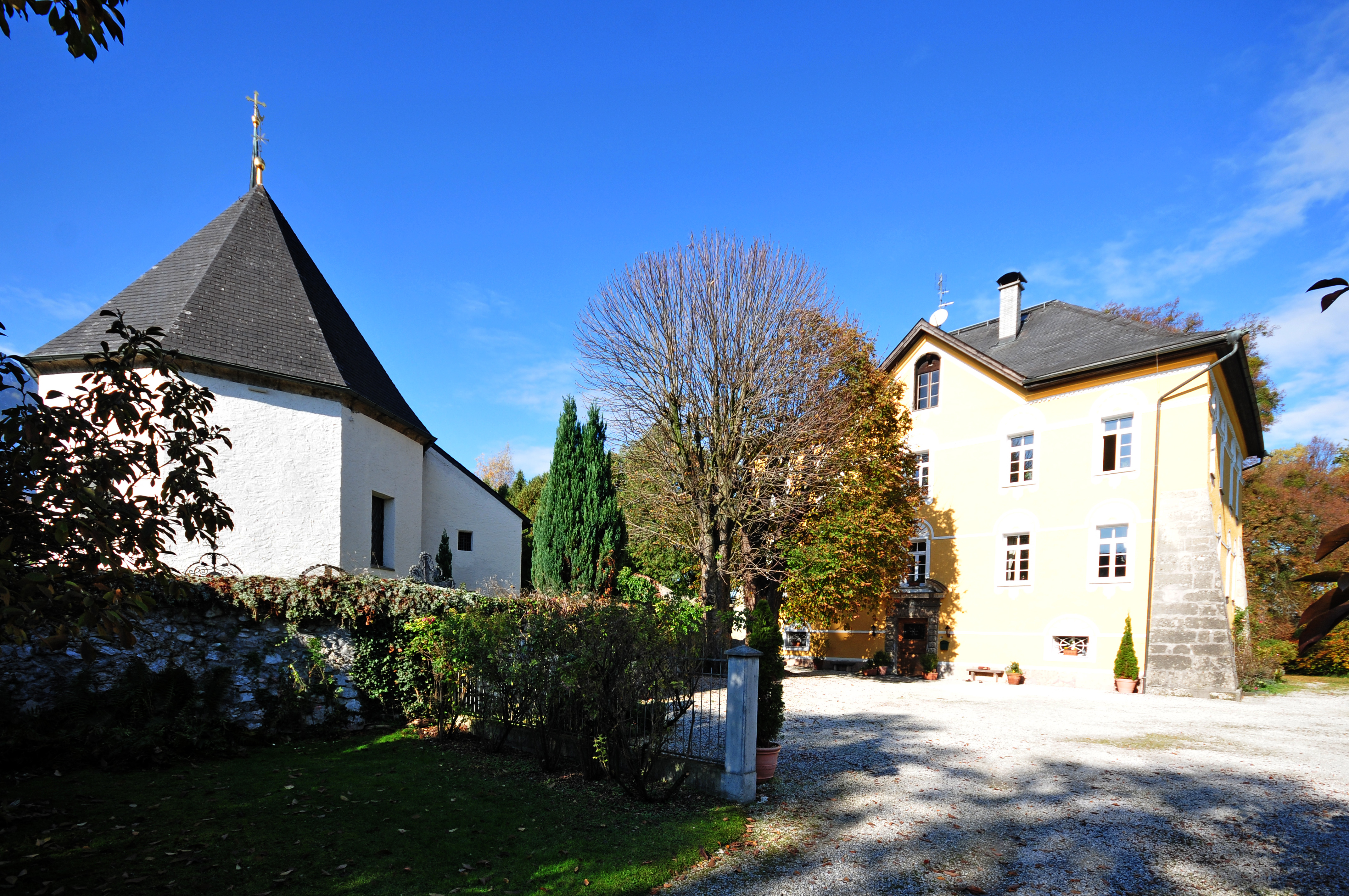 Schloss Lasseregg in Niederalm bei Anif, Salzburg und Pfarrkirche hl. Johannes der Täufer. Wikipedia im Landtag – Salzburg 31. Oktober 2012 in SalzburgDieses Foto wurde im Rahmen des Projektes „Wikipedia im Landtag“ erstellt.